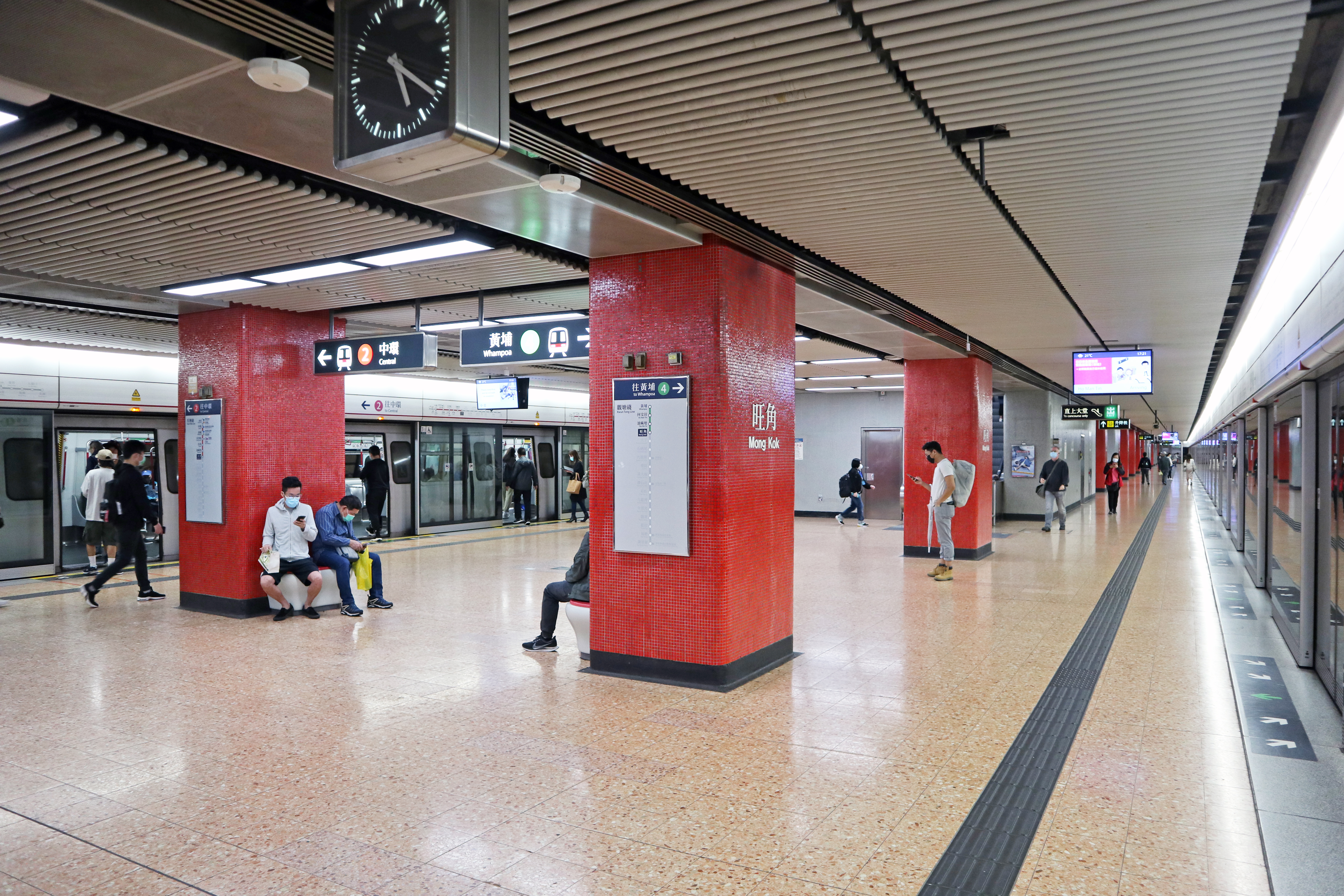 港鐵旺角站月台